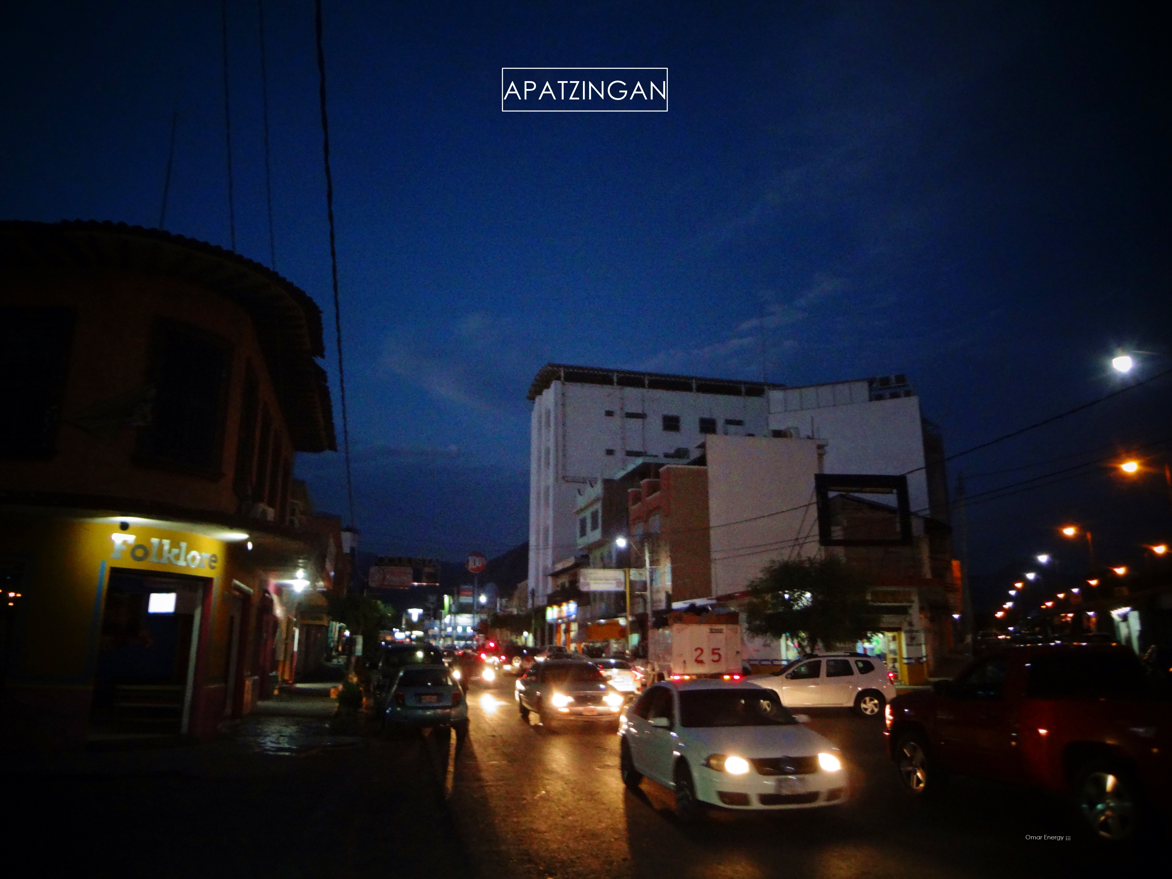 La Avenida Constitución en Apatzingan. Búscame en Facebook y en Youtube como; Omar Energy ¡¡¡ .